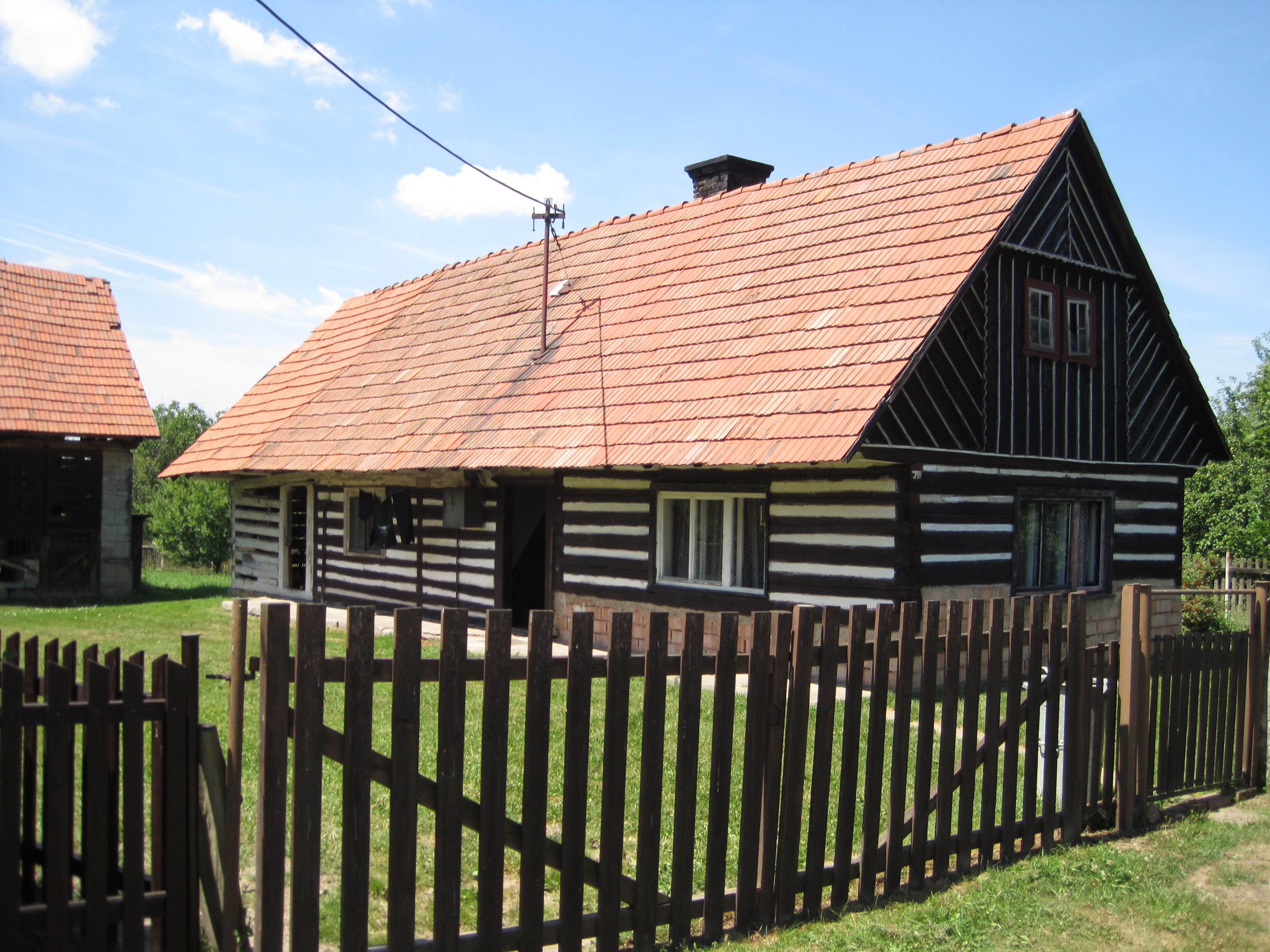 Dobšice (v Českém ráji) - chaloupka čp. 35